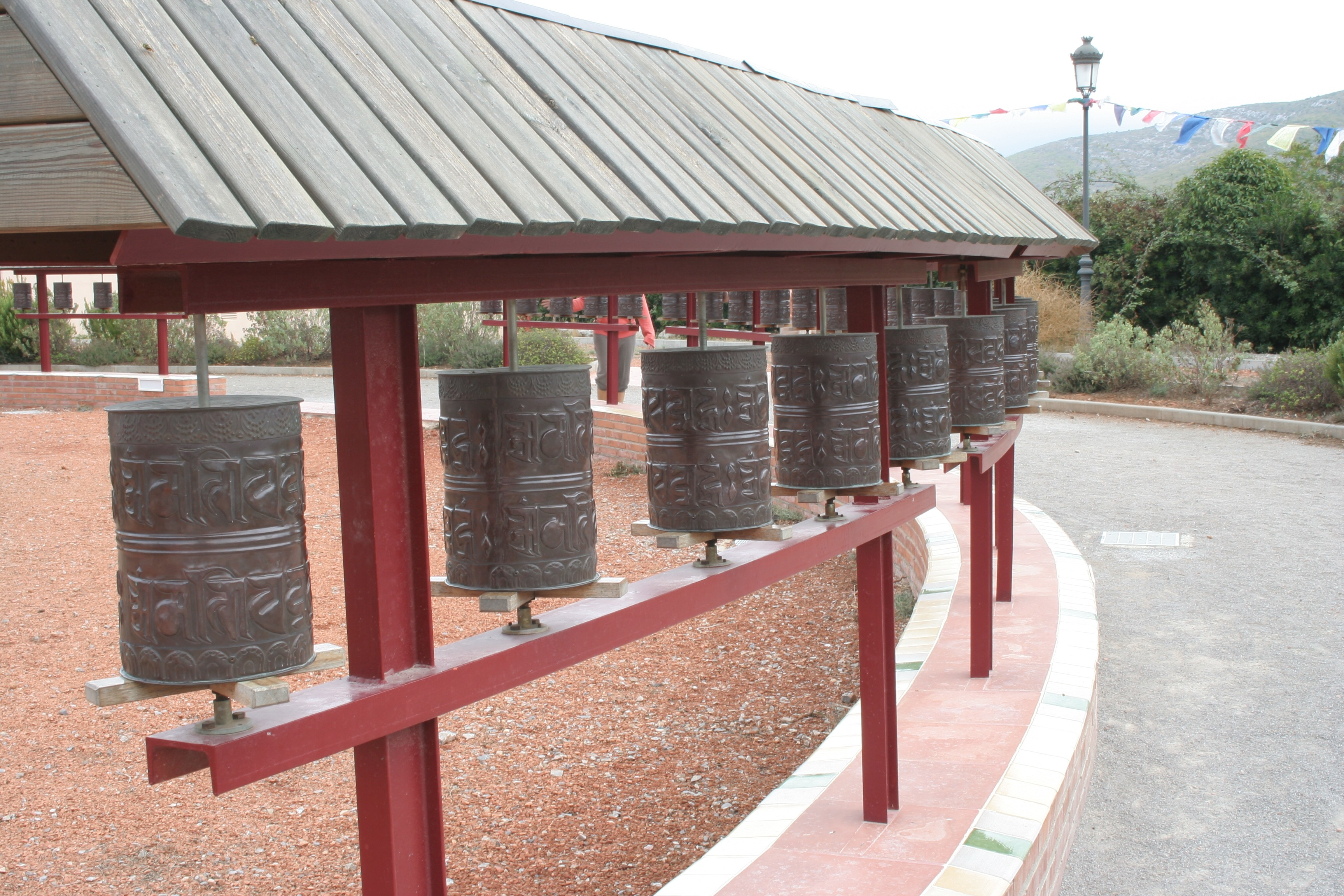 Monasterio budista el el Parc Natural del Garraf